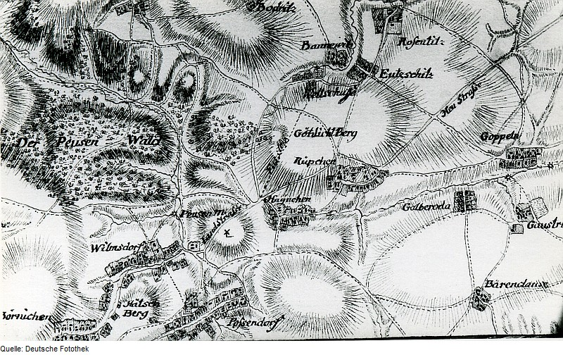 Original image description from the Deutsche Fotothek Bannewitz-Possendorf. Karte von einem Teil des Kurfürstentums Sachsen, Petri, nach 1759 (Sign.: VII 63)